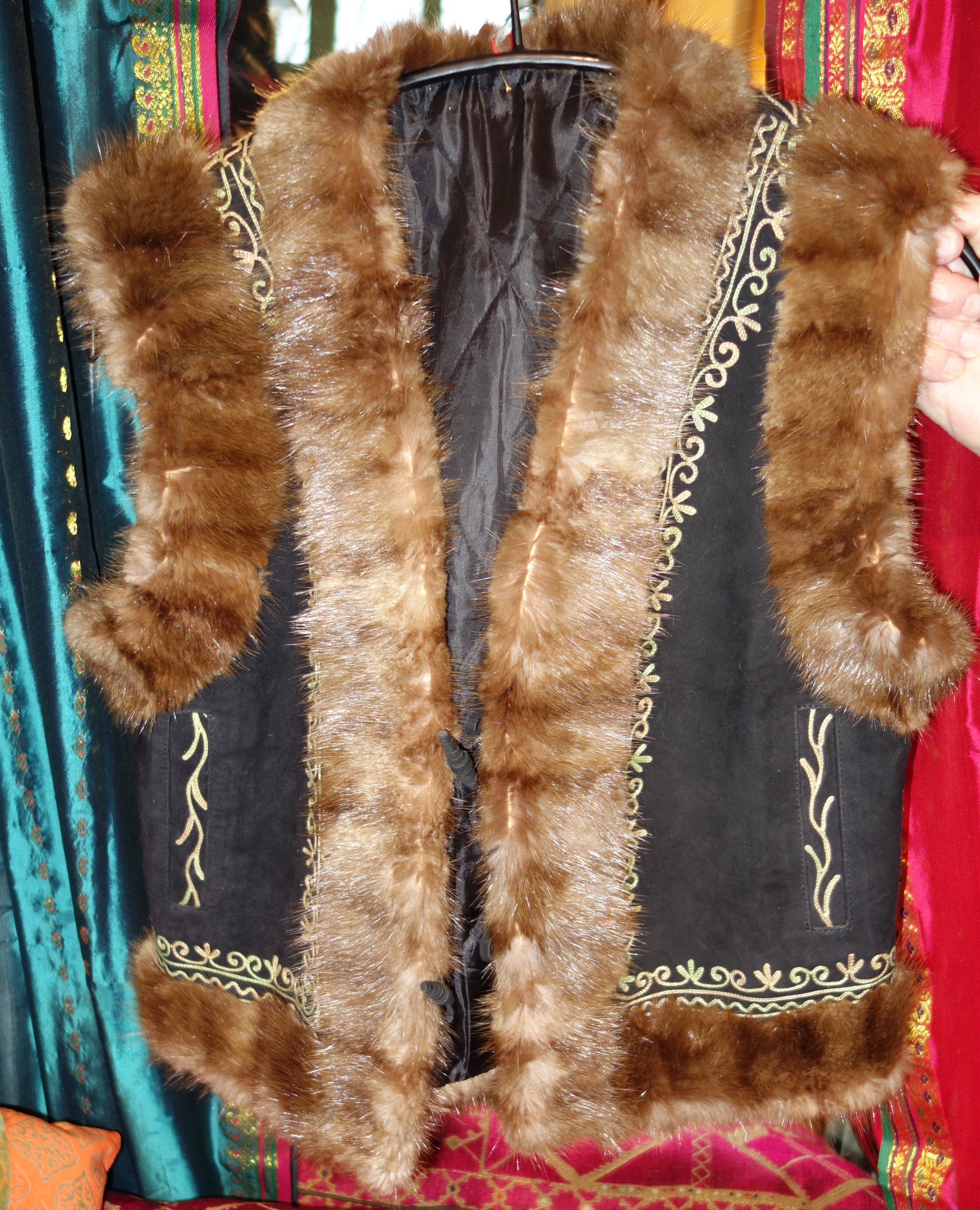 Stoffweste mit Nerzbisam-Verbrämung (offenbar wiederverwertetes Fell). Herstellungsland Nepal. Gesehen bei "Globales Sein", Barbara Schmiedel, Düsseldorf.